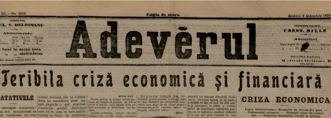 Criza economica 1899-1901 Sursa: ziarul Adevarul, 1899 Restricţii: Nu, datorită vechimii